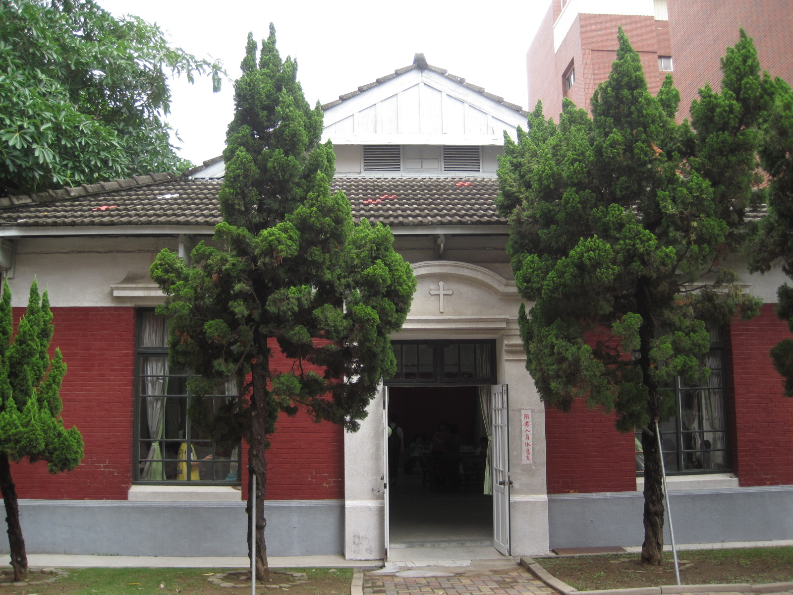 中文（台灣）: 原臺南長老教女學校講堂